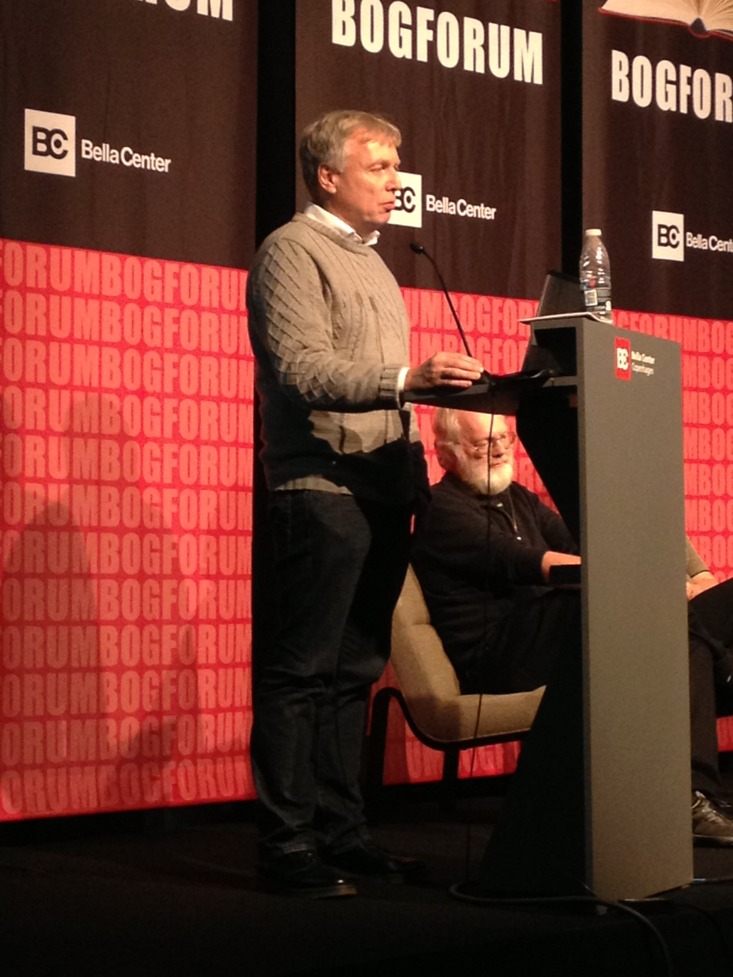 Uffe Elbaek na Bog Forum